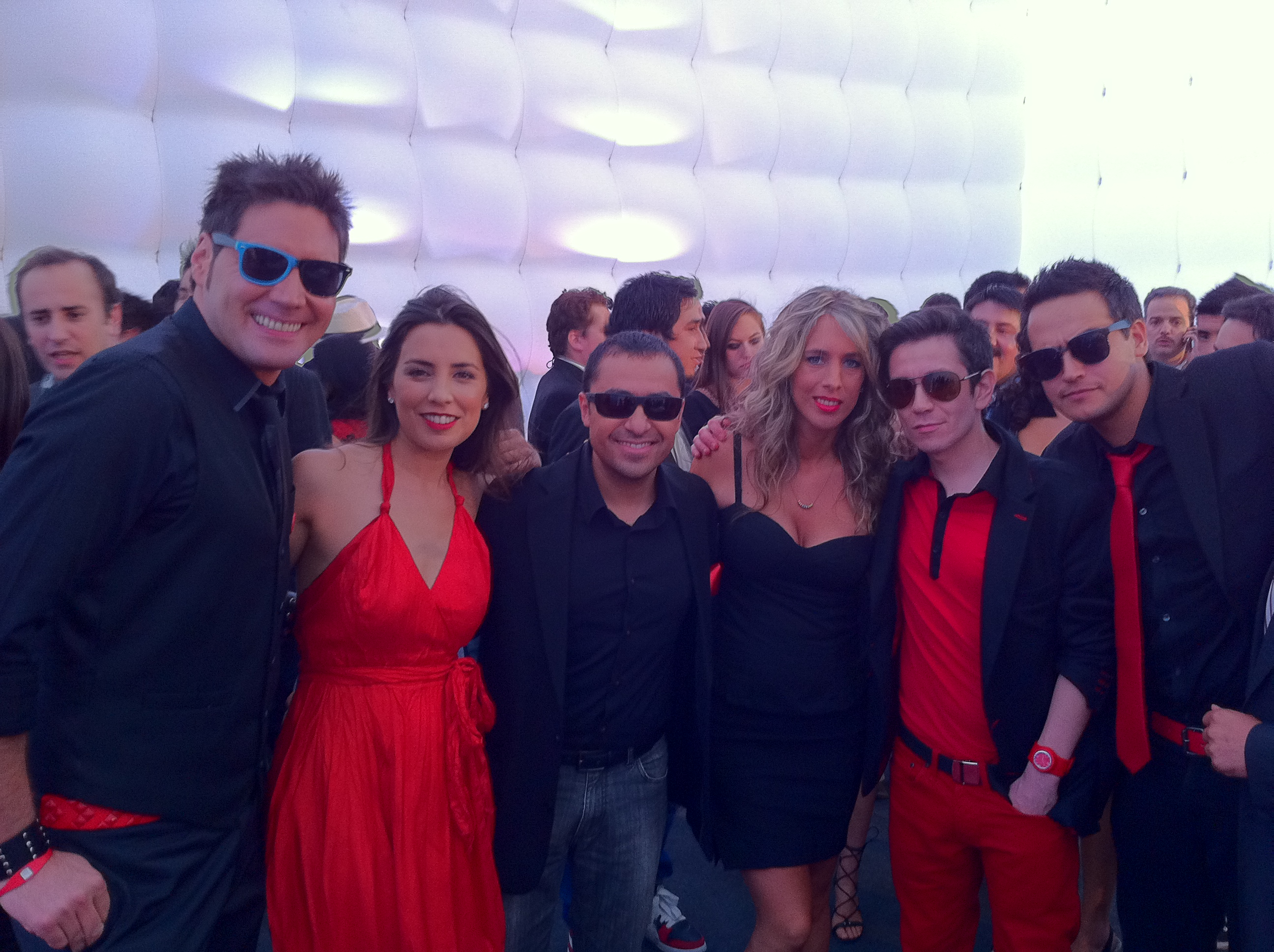 El grupo de panelistas del programa farandulero Alfombra roja (de Canal 13) asistiendo a los premios Copihue de Oro 2011. De izquierda a derecha: Francisco Saavedra, Lucía López, Cristián Pérez, Paulina Rojas, Carlos Cisterna y César Barrera.